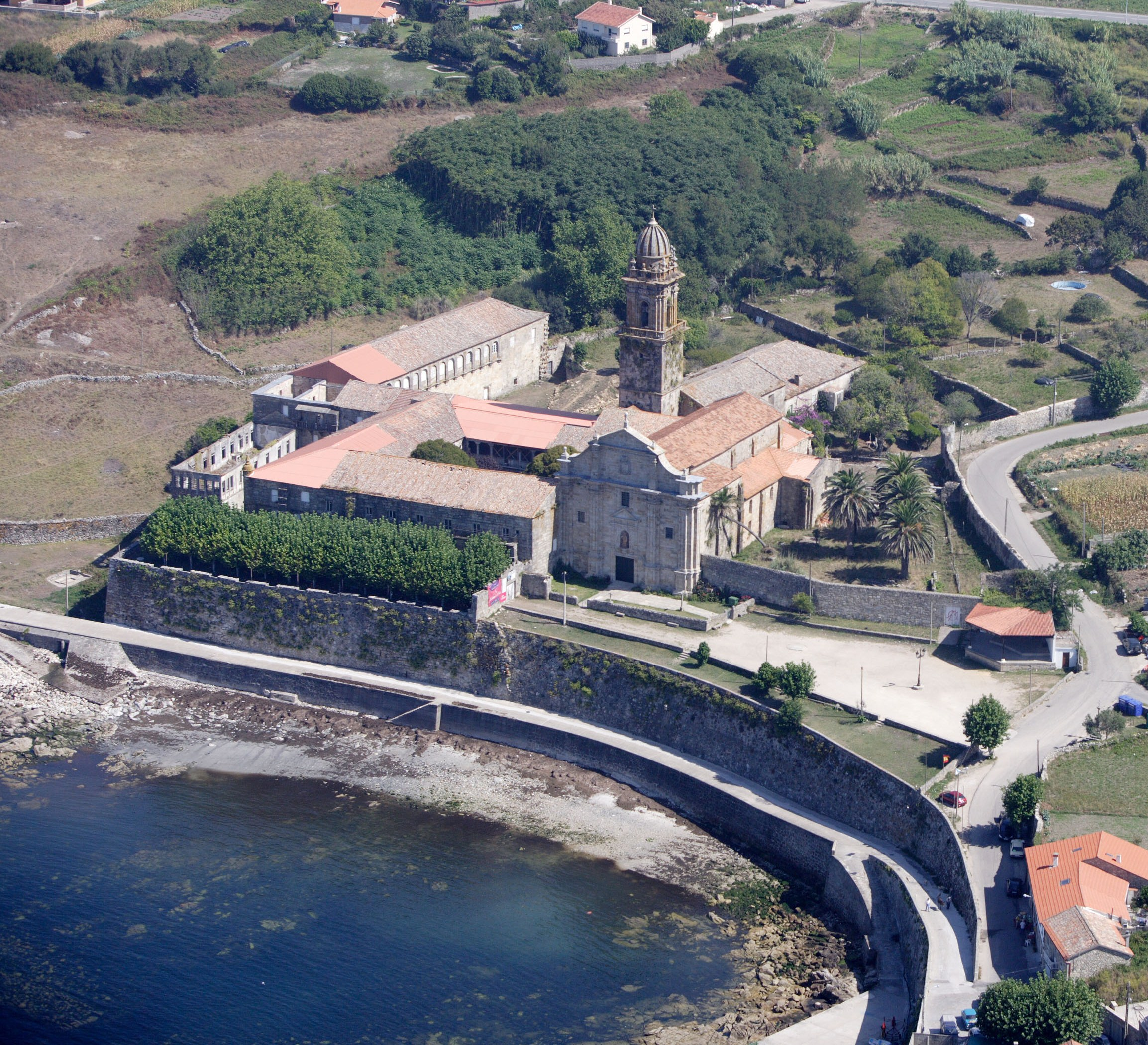 Vista Aérea del Monasterio de Oia